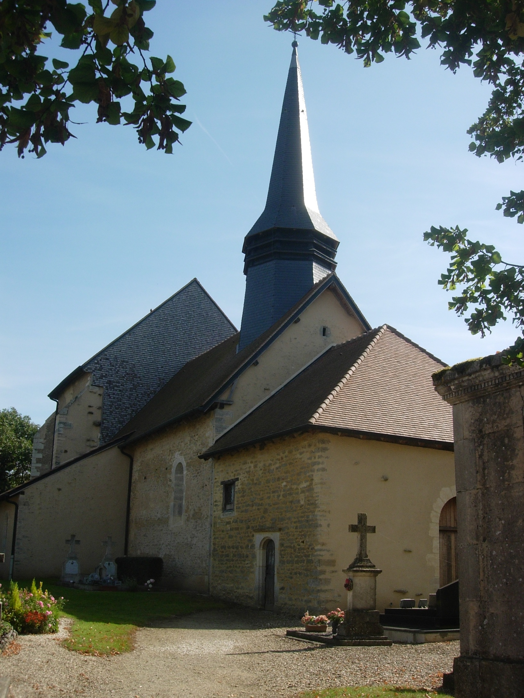 Eglise de Fuligny (Aube)